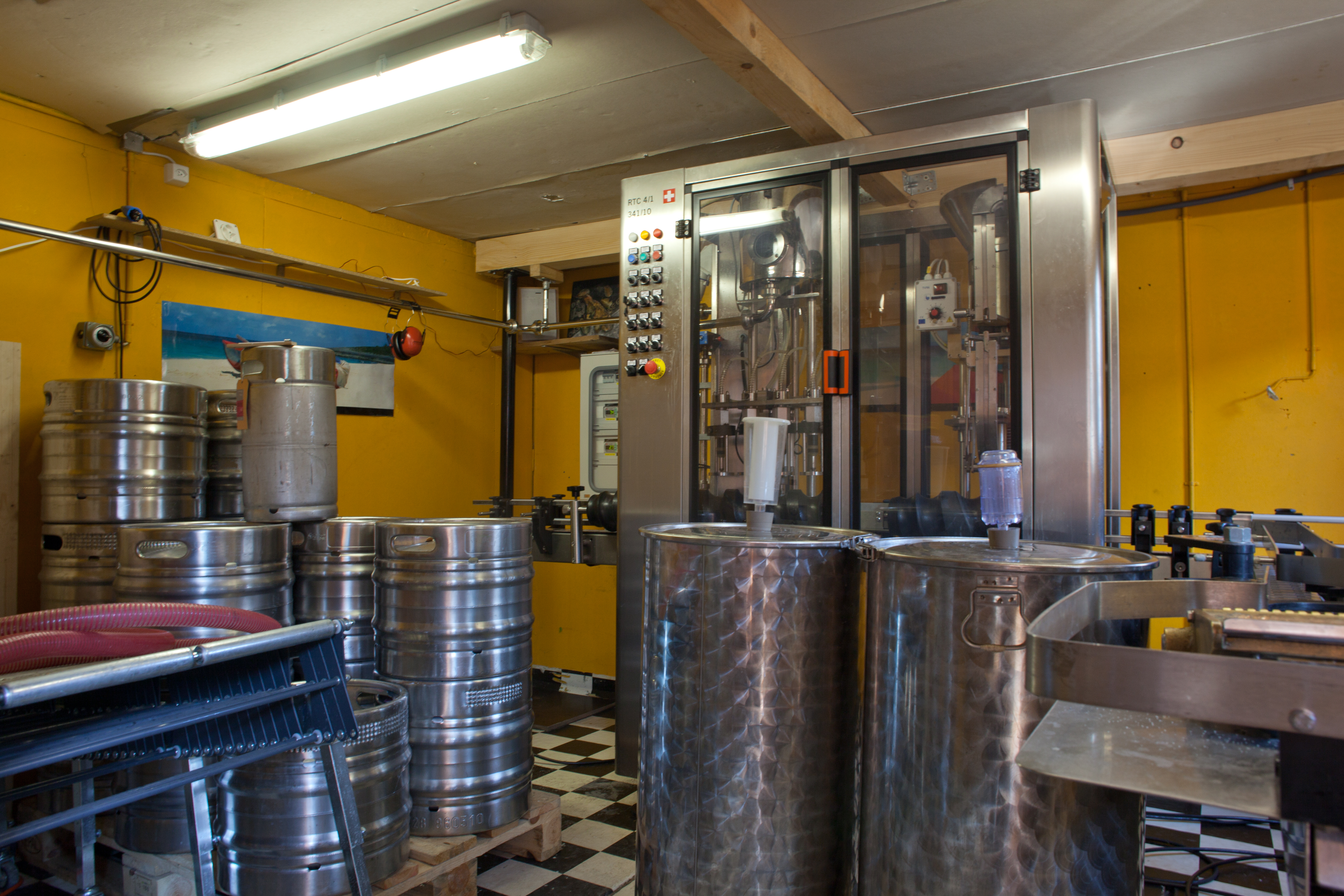 Docteur Gab's à Épalinges : la salle de mise en bouteille.